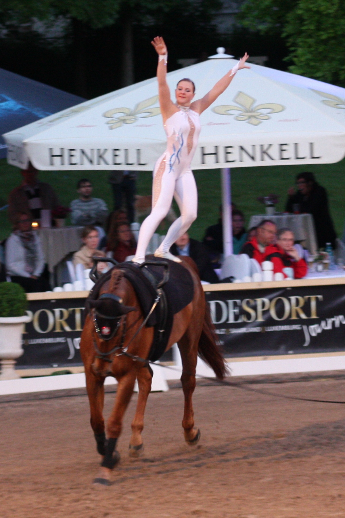 77. Internationales Pfingstturnier Wiesbaden 2013, CVI *** Voltigieren, Simone Jäiser mit Luk Personality rights warning Although this work is freely licensed or in the public domain, the person(s) shown may have rights that legally restrict certain re-uses unless those depicted consent to such uses. In these cases, a model release or other evidence of consent could protect you from infringement claims.